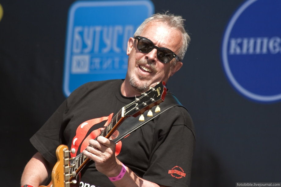 Андрей Макаревич, "Машина времени". Фестиваль "Рок над Волгой 2010"